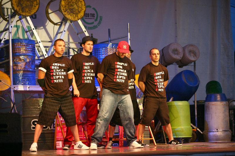 Dupa ce au voluntariat in actiunea de ecologizare a plajei din Constanta, baietii de la Simplu au sustinut un super concert in parcarea de la City Park Mall.